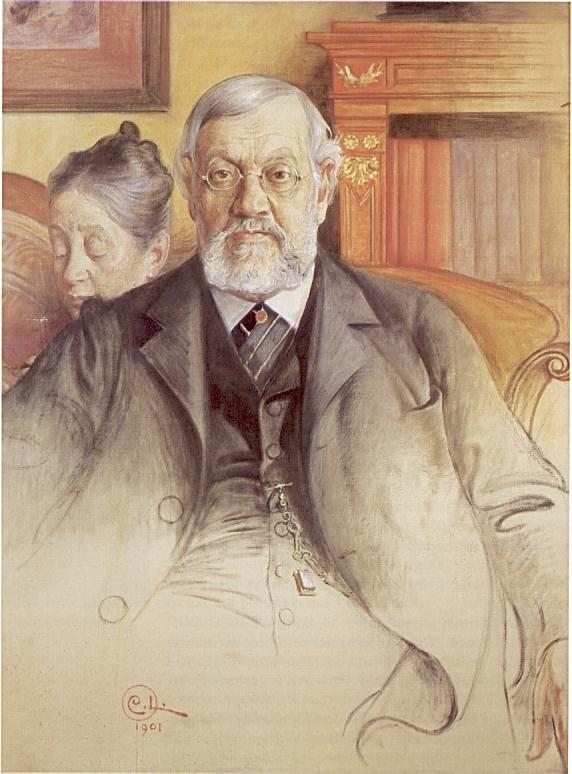 Wilhelm and Emelie Josephson 1901.